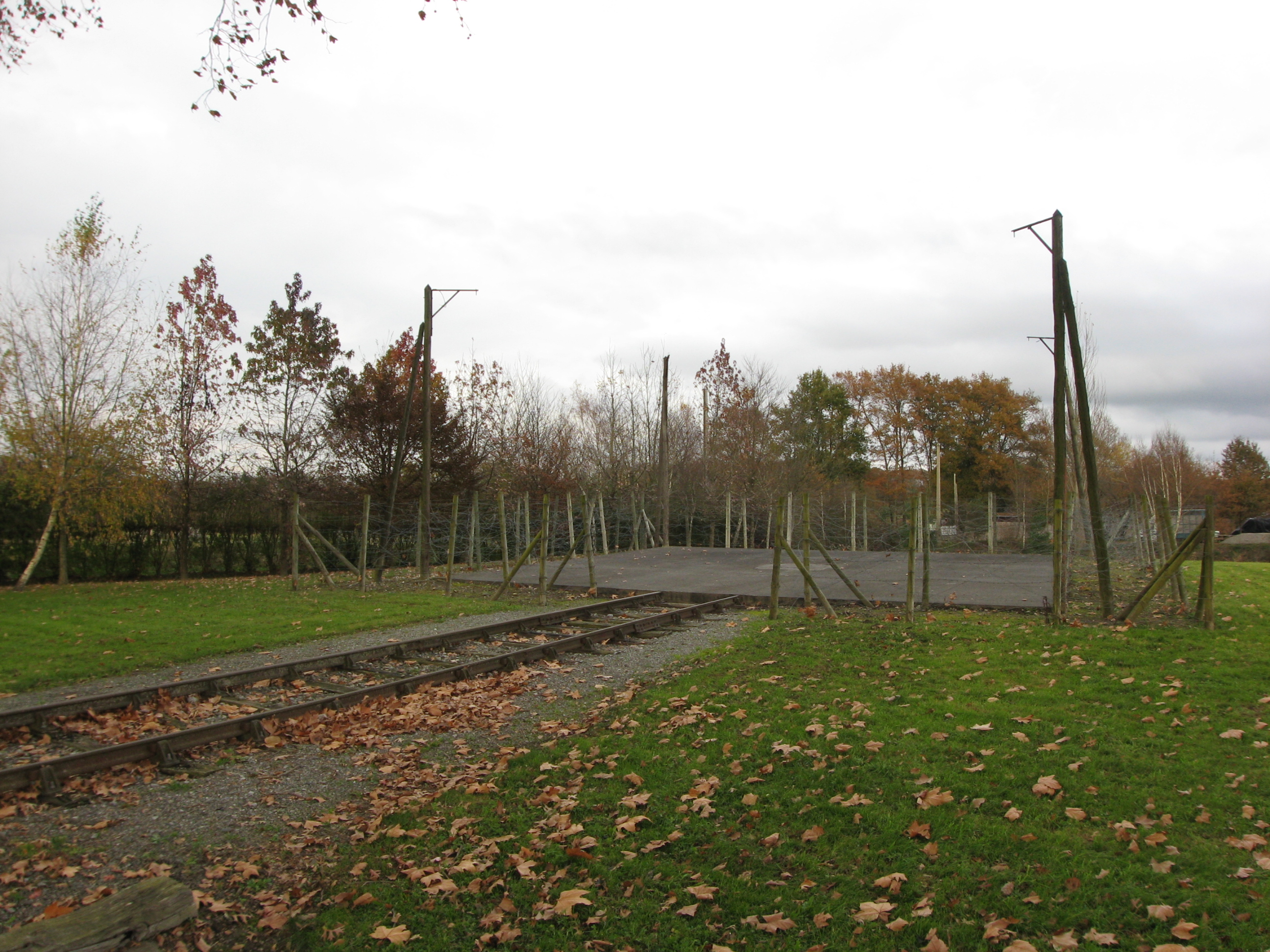 Monument contemporain representant des barbelés et rails pour déportation au Camps de Gurs (Pyrénées-Atlantiques) (Pyrénées).